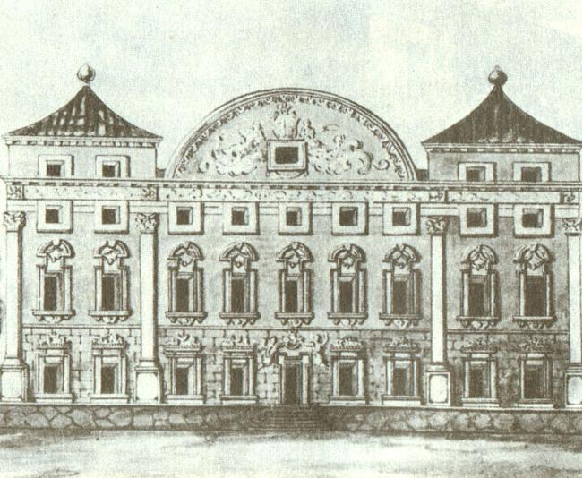 Sapiegų rūmai, Vilniuje. Pasiega`s Palace in Vilnius, Lithuania.